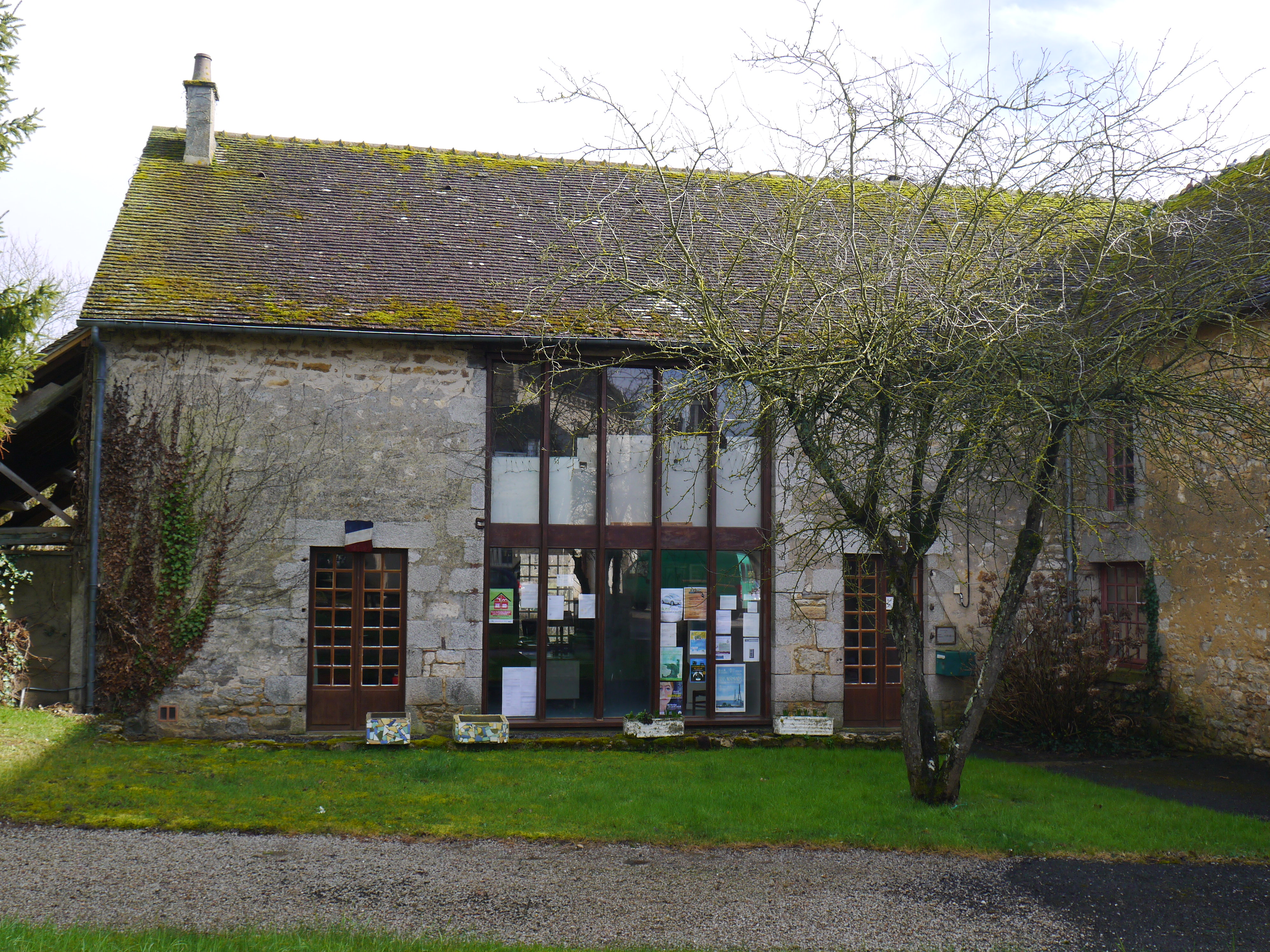 La mairie.